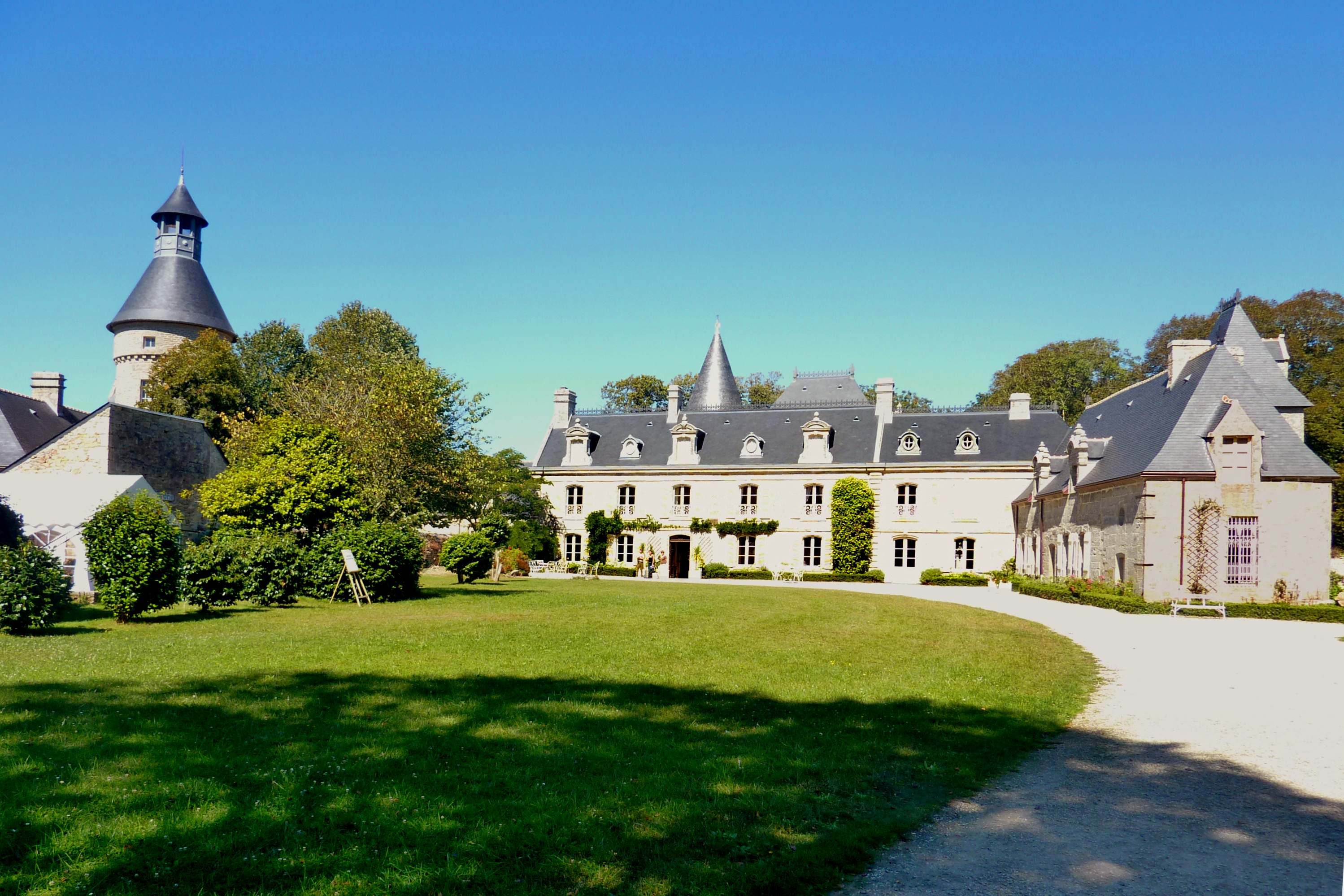 Manoir de Kerazan, vue d'ensemble depuis le parc; Loctudy